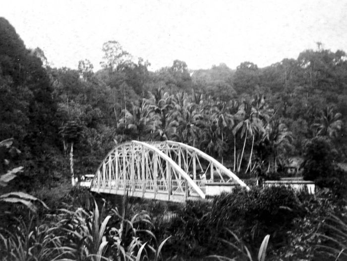 Repronegatief. Een brug bij Bondjol, West-Sumatra